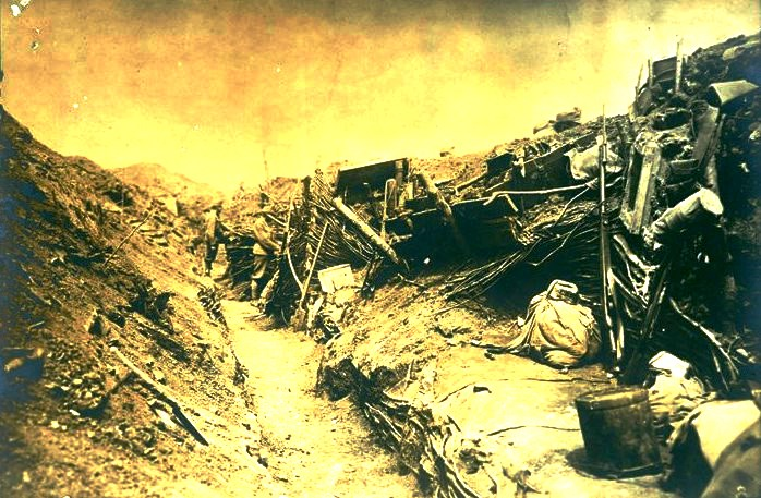 Снимка на разрушени от руската артилерия австро-унгарски окопни позиции в Източна Галиция през Първата световна война.